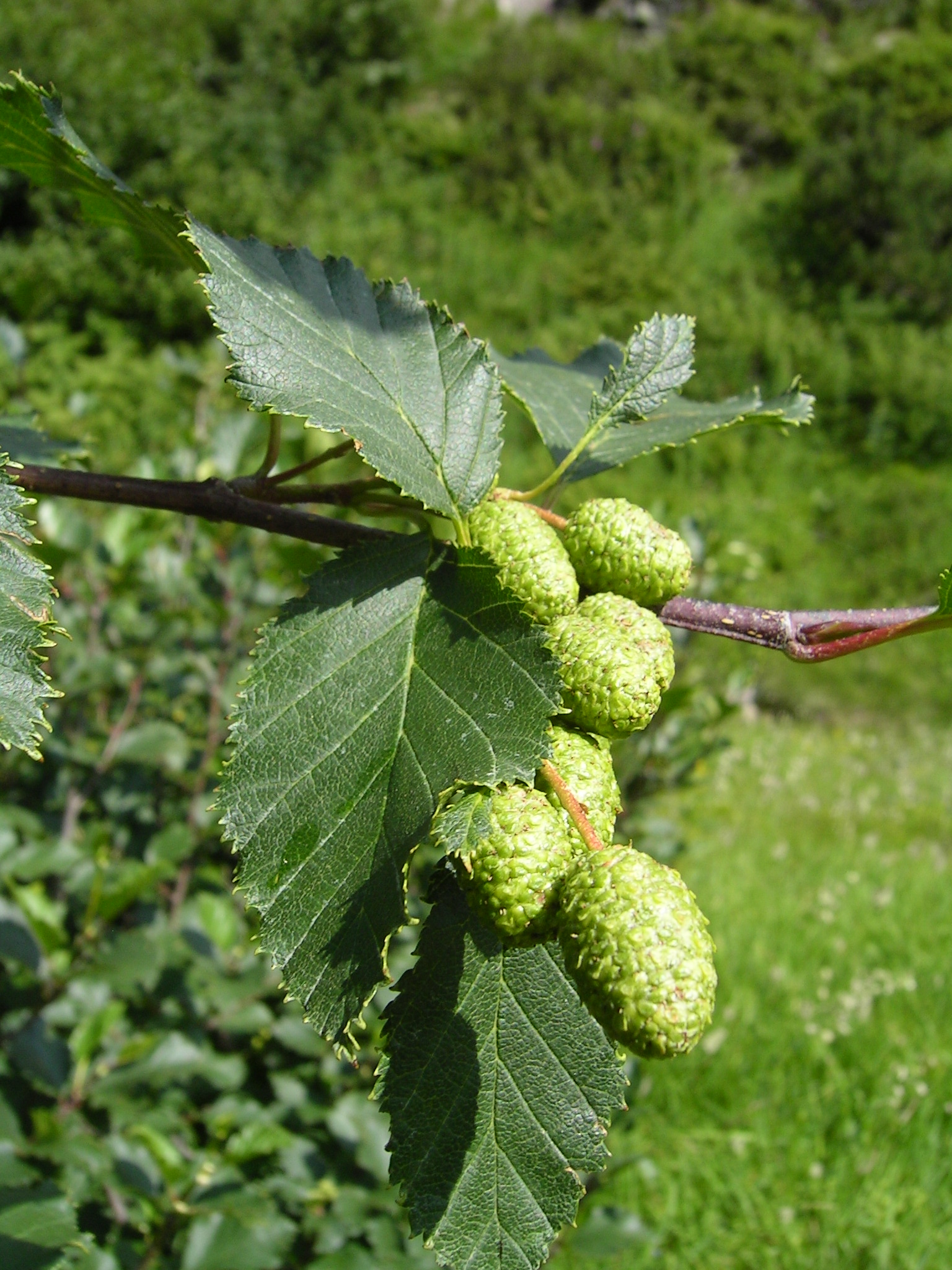 (en) Green Alder fruits Alnus viridis (syn. Alnus alnobetula) (de) Früchte der Grün-Erle Alnus viridis (syn. Alnus alnobetula) Aufnahmeort/Place: Berner Oberland, Susten, CH